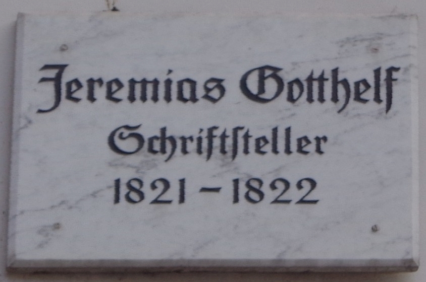 Göttinger Gedenktafel für Jeremias Gotthelf (Papendiek 10)